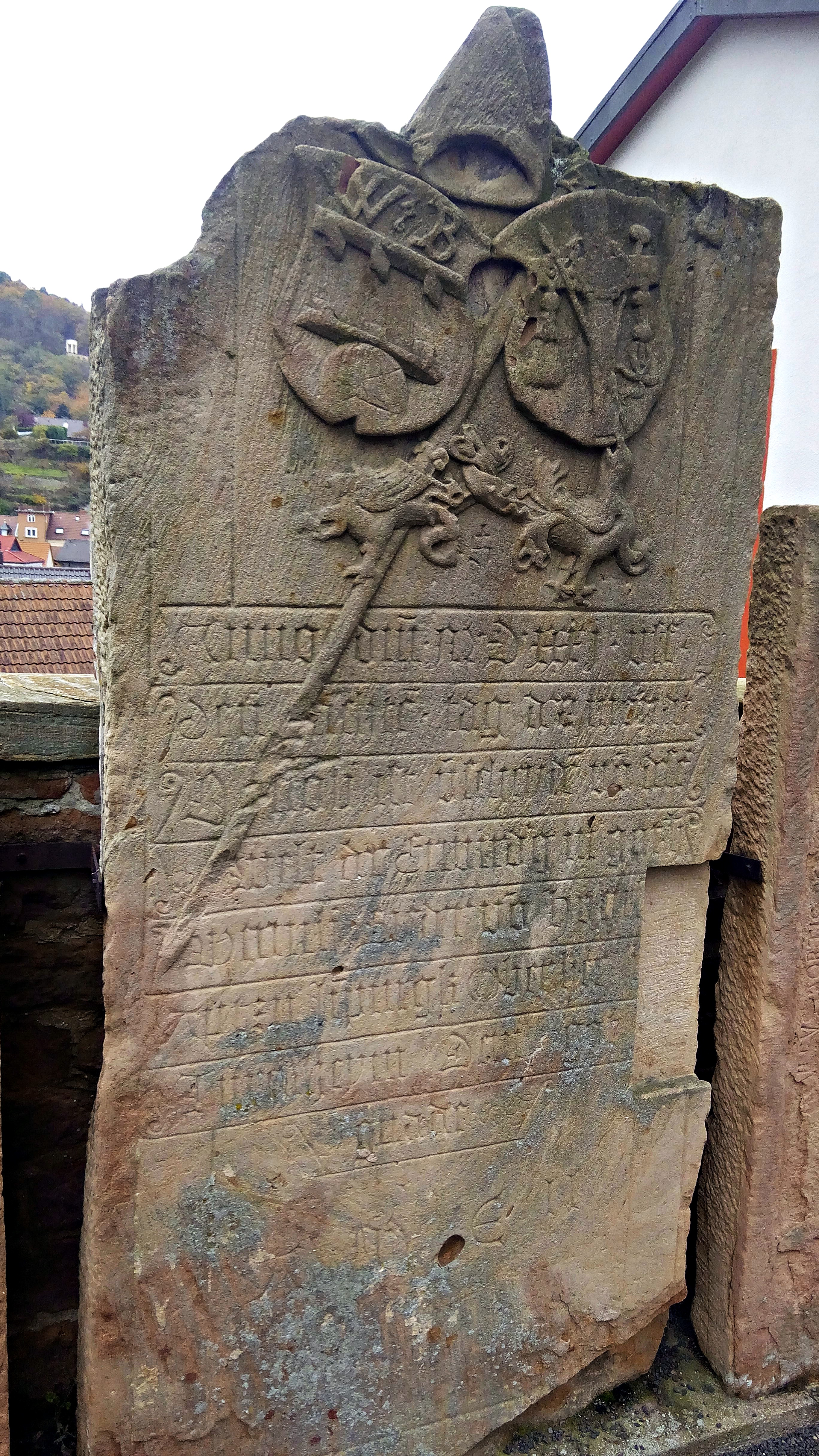 Schlosskirche Bad Dürkheim, Außengelände, Grabstein des Limburger Abtes Werner Breder von Hohenstein (+ 1531)